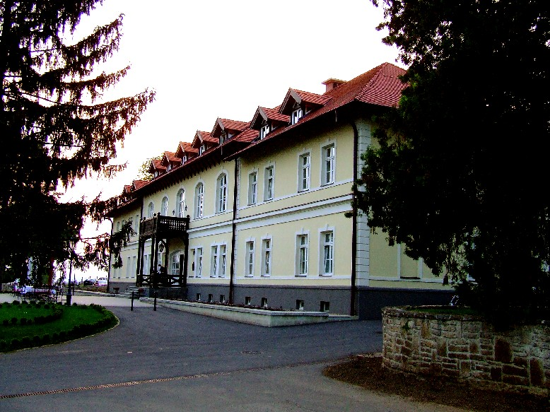 Degenfeld kastély, Tarcal. Saját kép. . Egresi János 2006. szeptember 23., 16:17 (CEST)